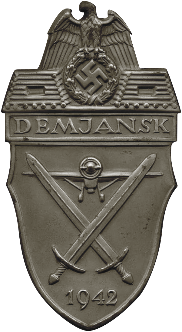 Demjanskschild